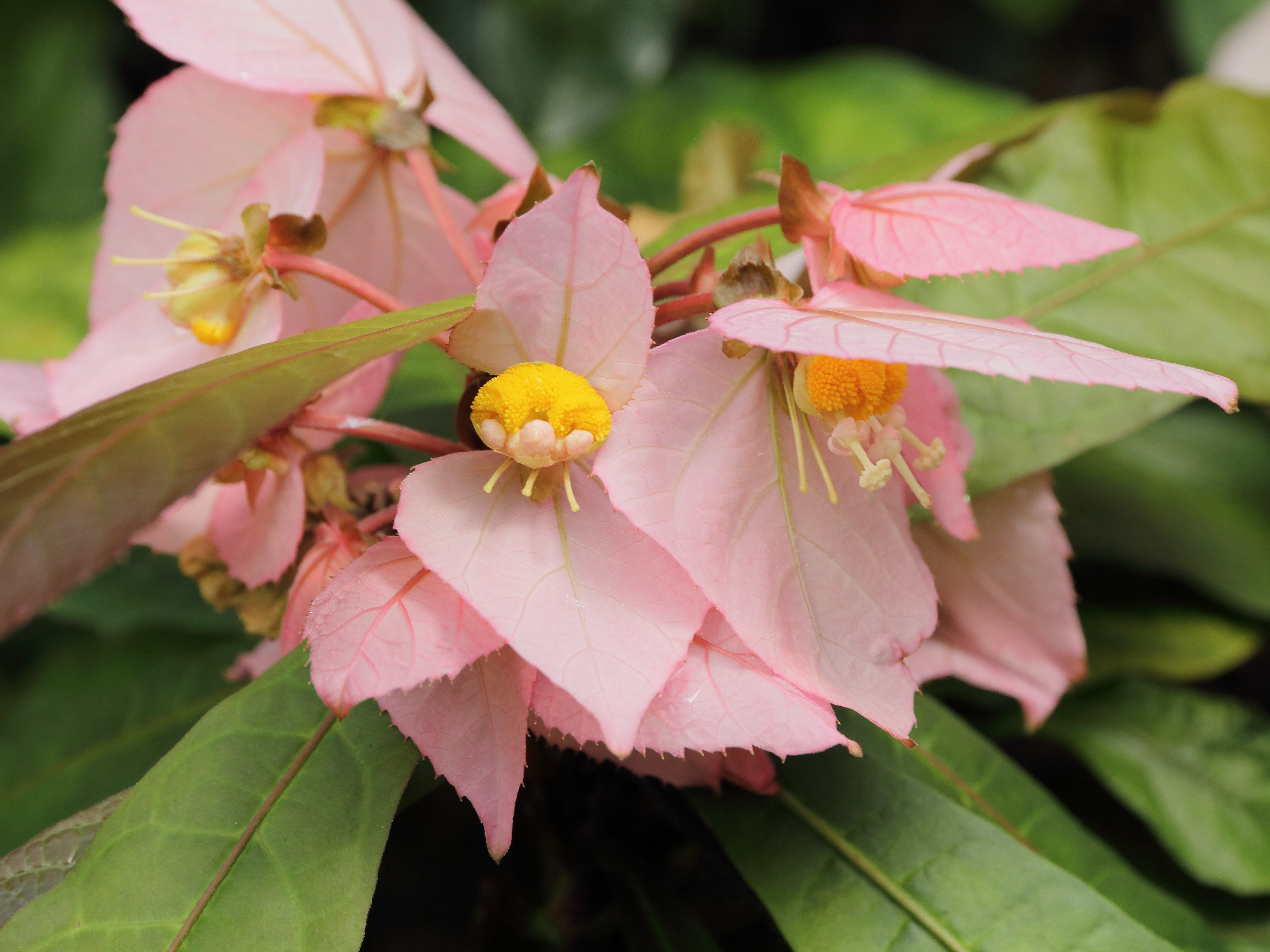 Dalechampia spathulata i Bergianska trädgården.